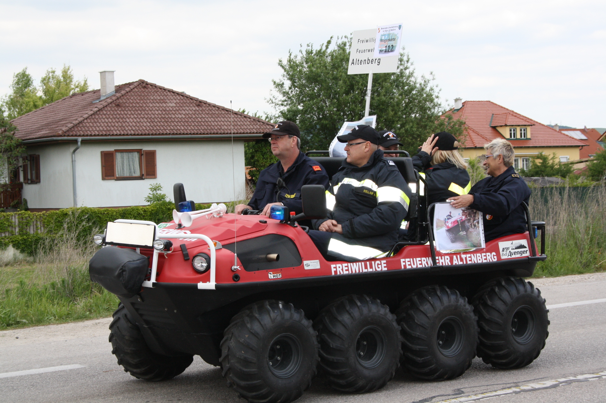 Amphibisches Einsatzfahrzeug vom Typ Argo Avenger der FF Altenberg (Gemeinde St. Andrä-Wordern, Österreich). Mehr Information auf der Homepage der Feuerwehr.